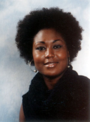 Photographie de Michele Magema - date inconnue